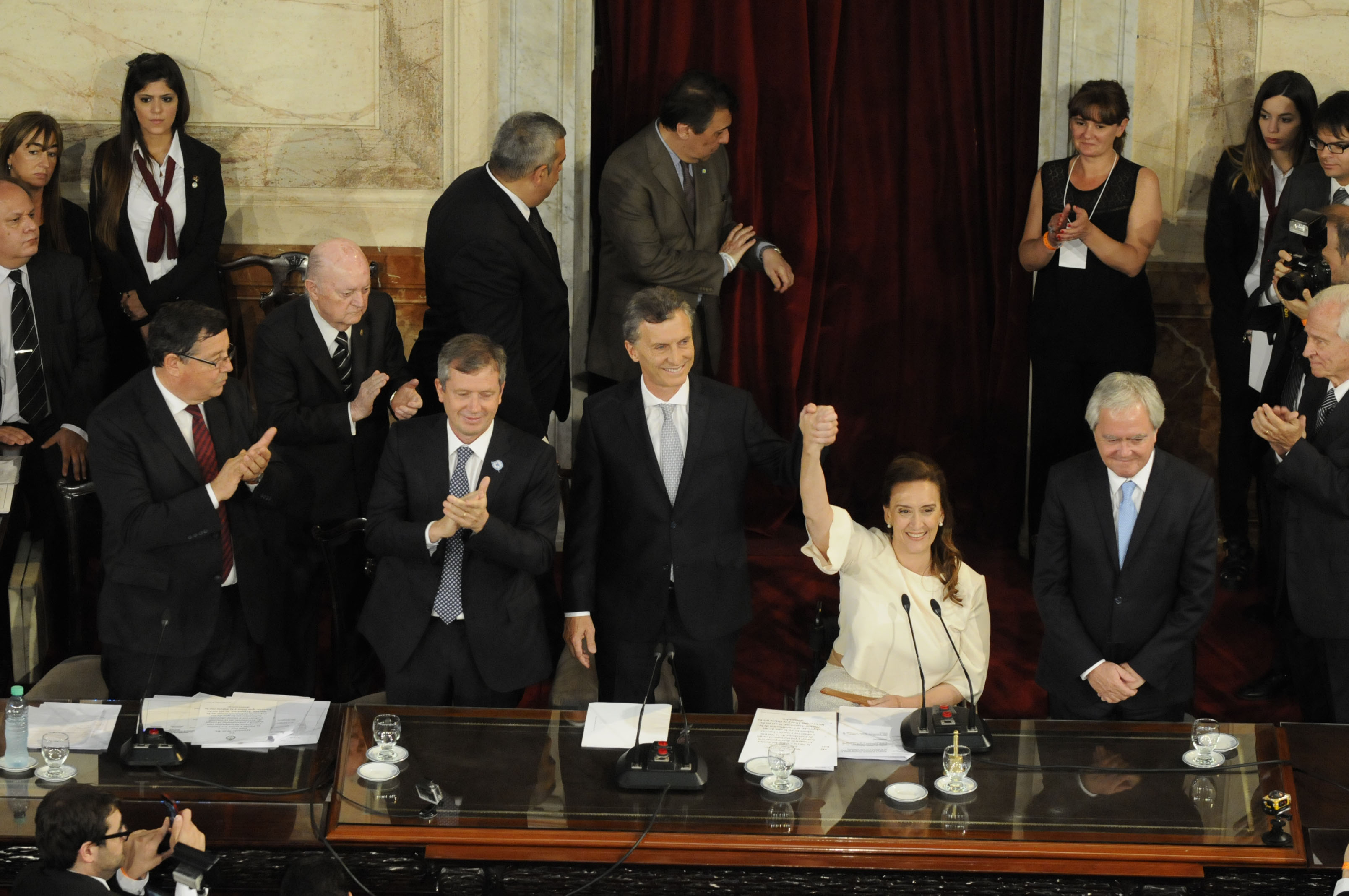 Jura de Mauricio Macri y Gabriela Michetti en el Congreso